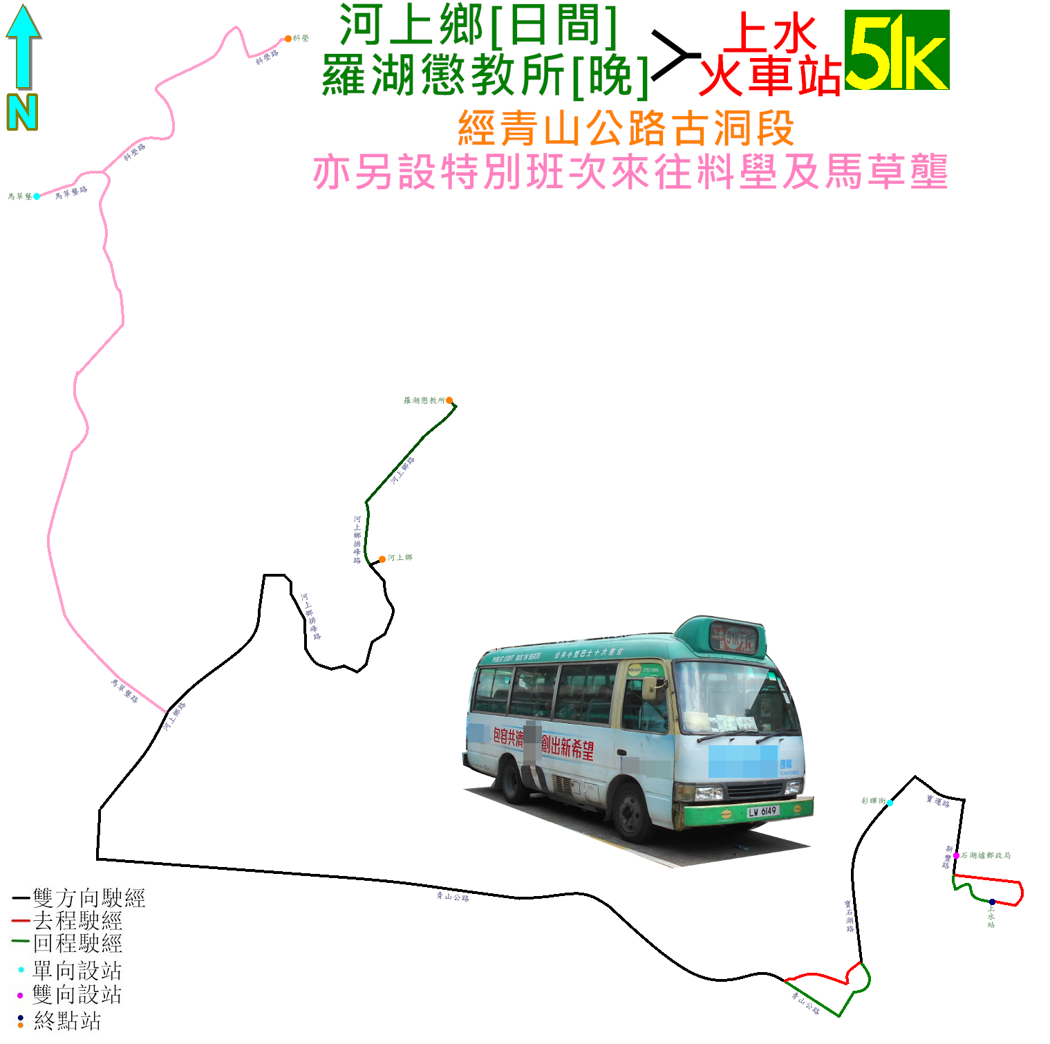 中文（香港）: 新界專線小巴51K線的走線圖，當中粉紅色表示往馬草壟及料壆特別班次的走線